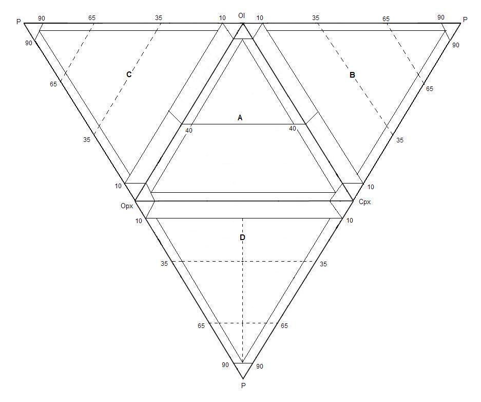 Diagram klasyfikacyjny skały gabrowe (BCD) i ultramaficzne (A)